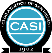 San isidro logo